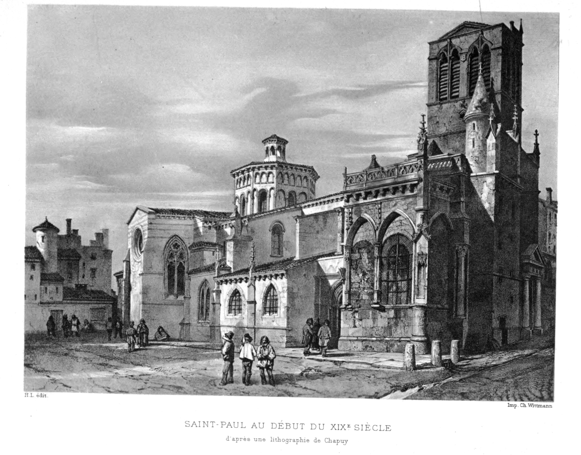 Illustration pour l'Histoire des églises et chapelles de Lyon